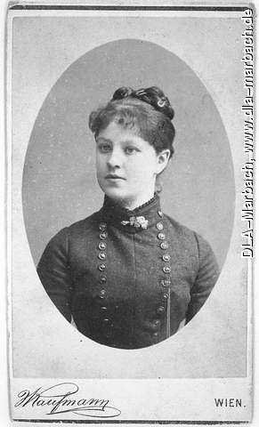 Maria Reinhard im schwarzen Kleid